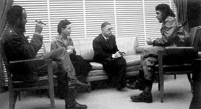 Ernesto Che Guevara reunido con Simone de Beauvoir y Jean Paul Sartre, en Cuba. 1960. Antonio Núñez Jiménez is at left.